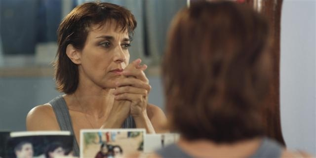 חגית דסברג בסרט החיים בינתיים